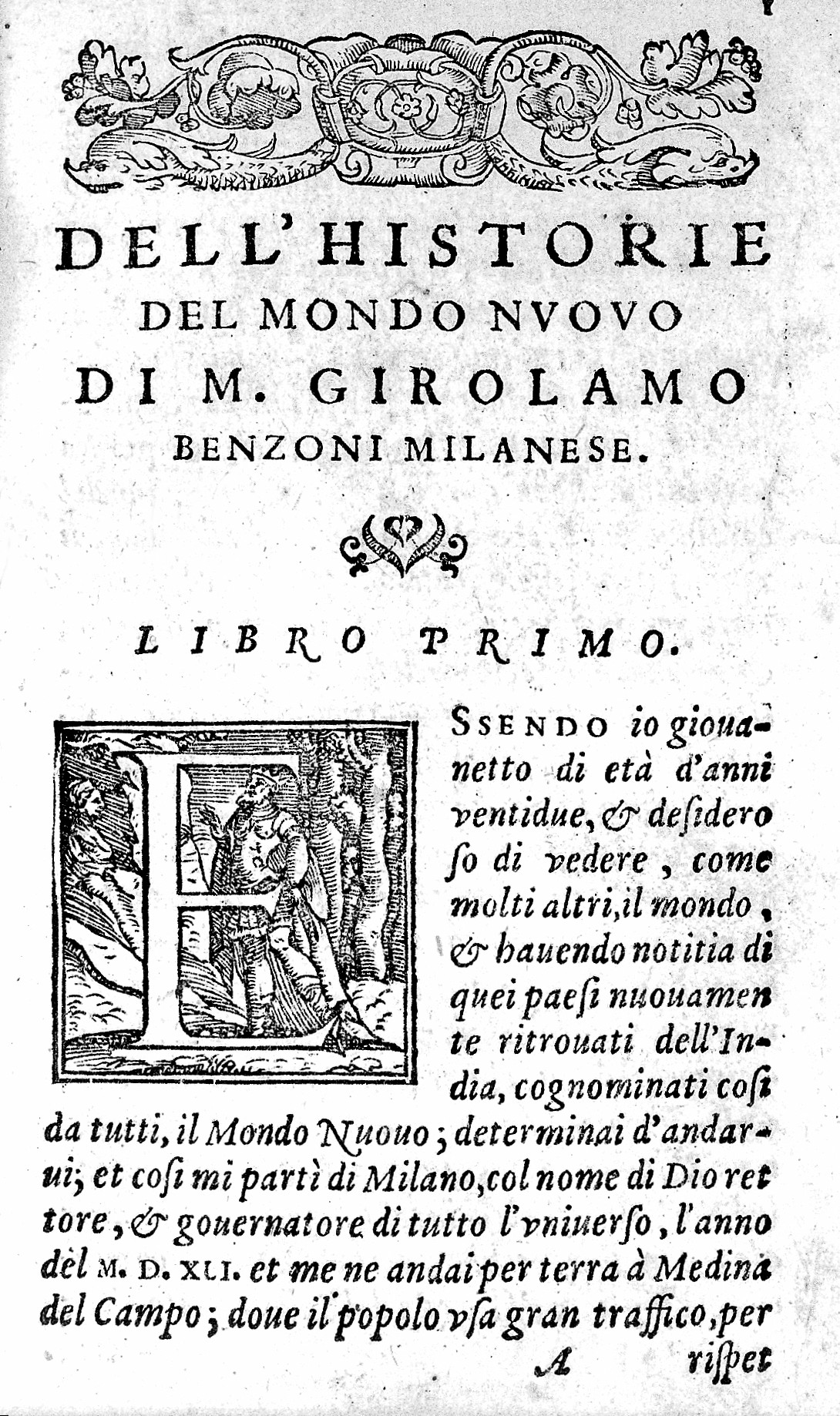 Rare Books Keywords: Girolamo Benzoni